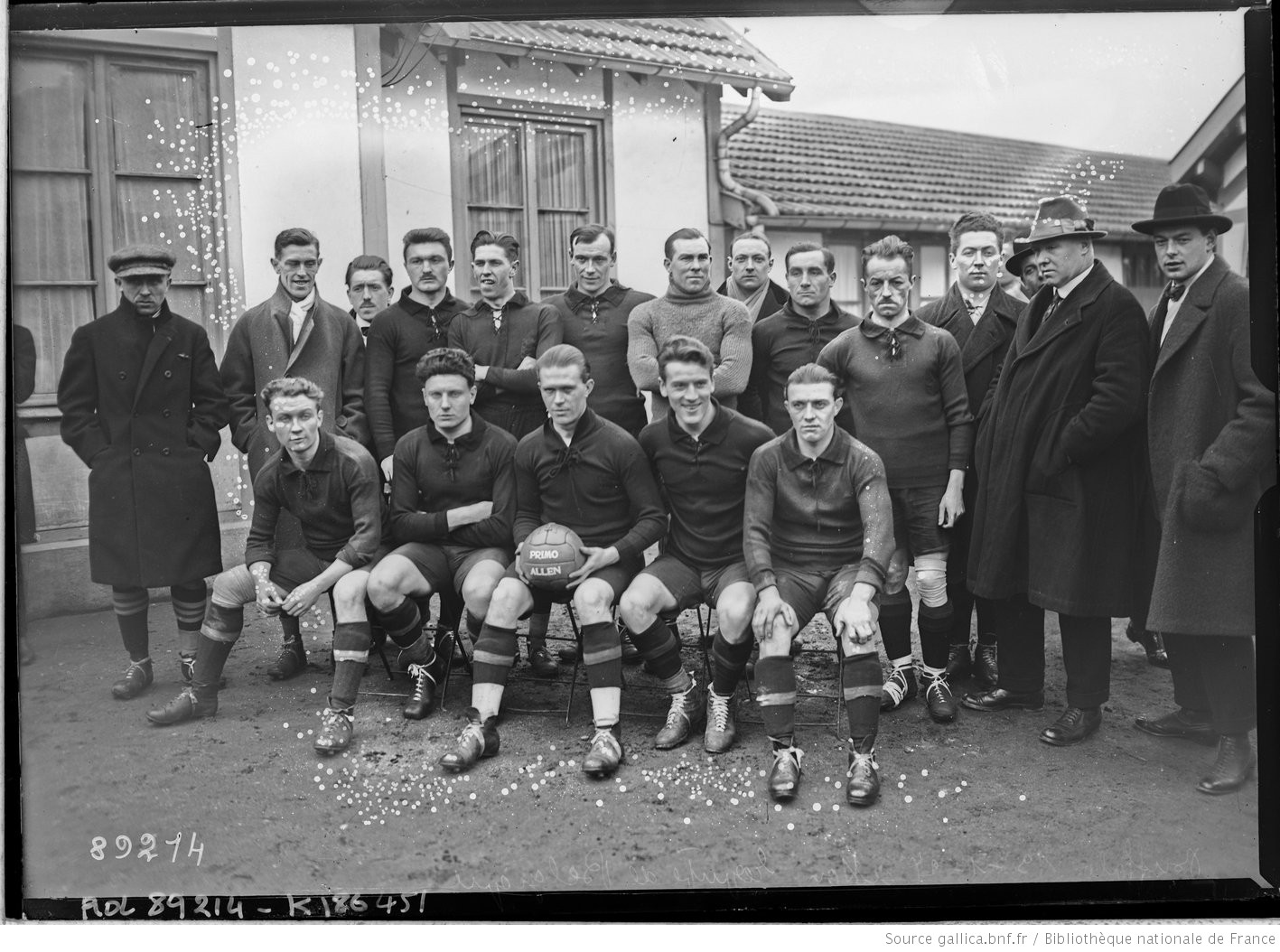 [Stade] Buffalo, 13-1-24, [football] association, équipe de Belgique : [photographie de presse] / [Agence Rol]